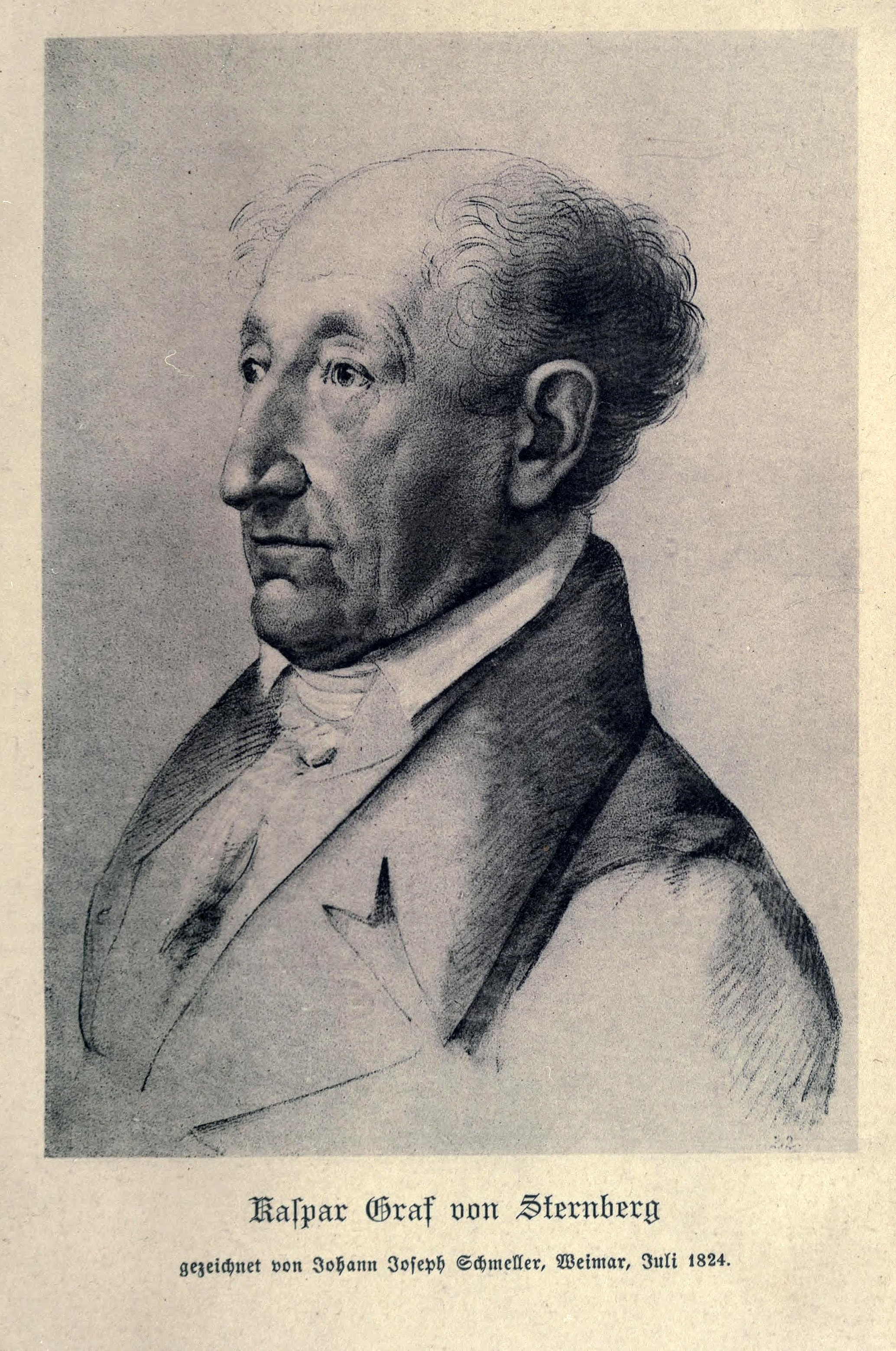 Zeichnung